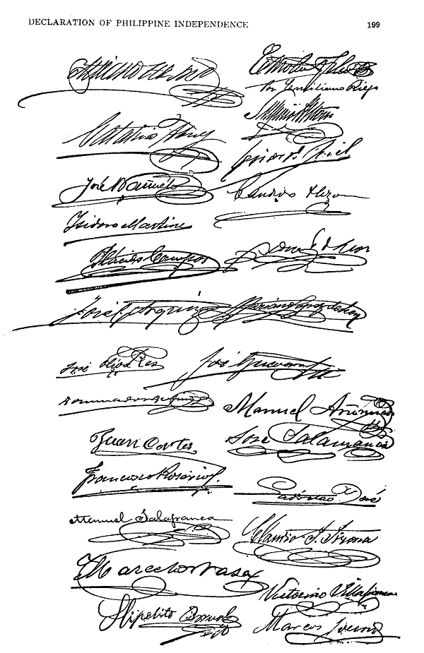 parte 15 del Acta de la proclamación de independencia del pueblo Filipino, se encuentra en español.